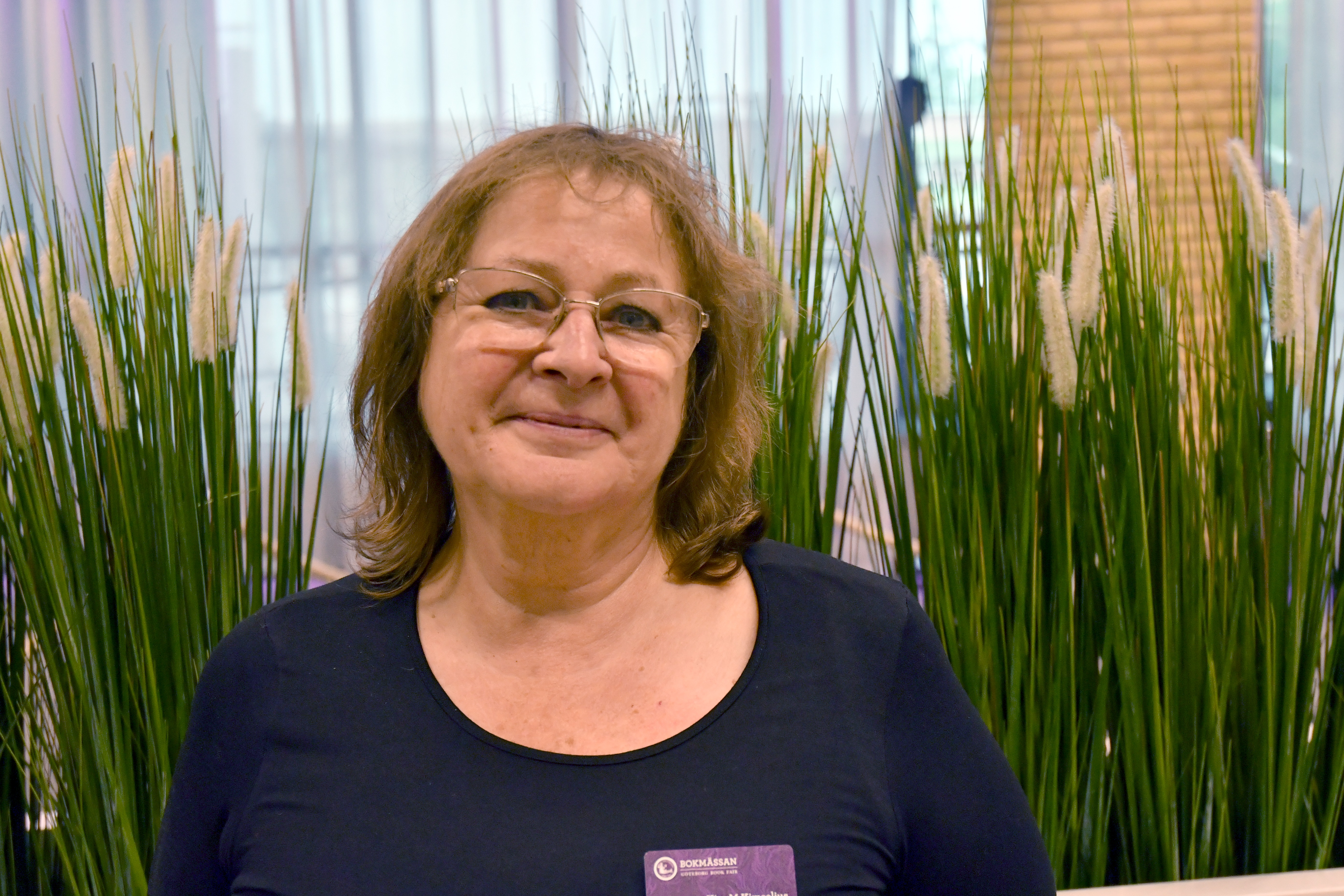 Kim M Kimselius under Bokmässan i Göteborg den 27 september 2018.